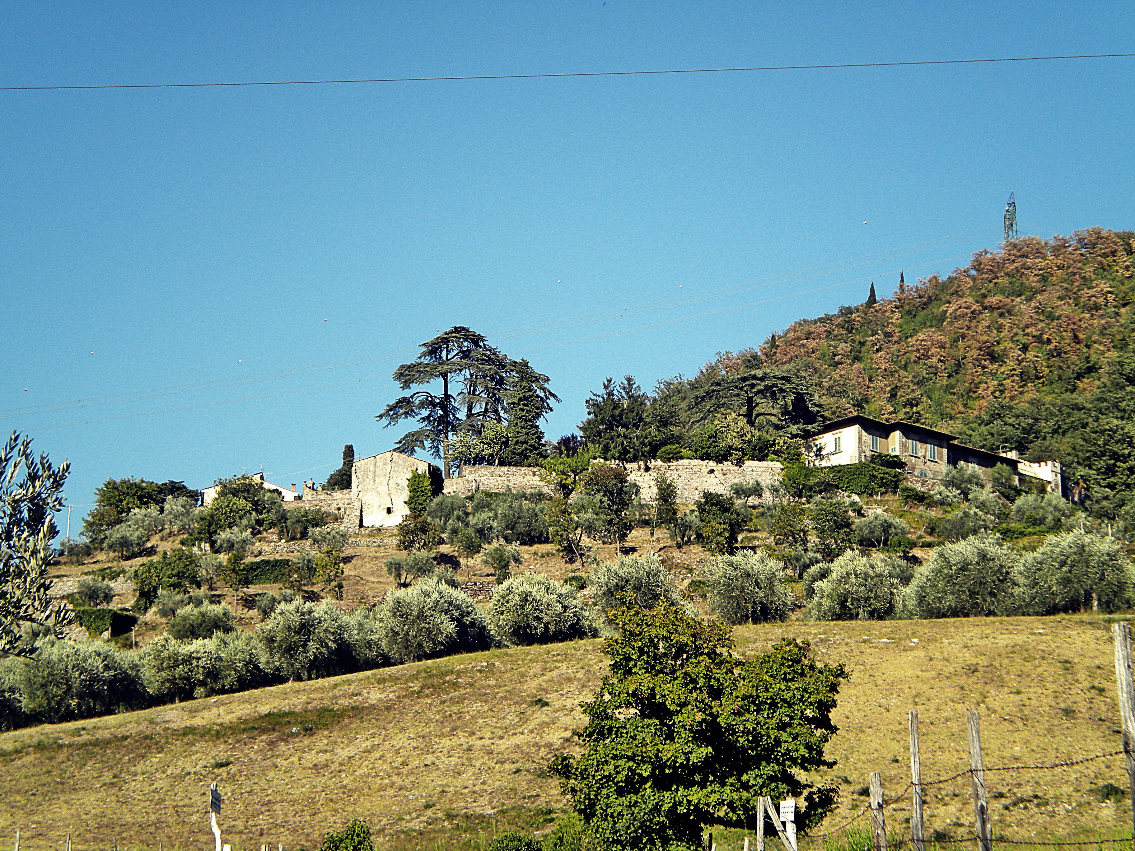 villa